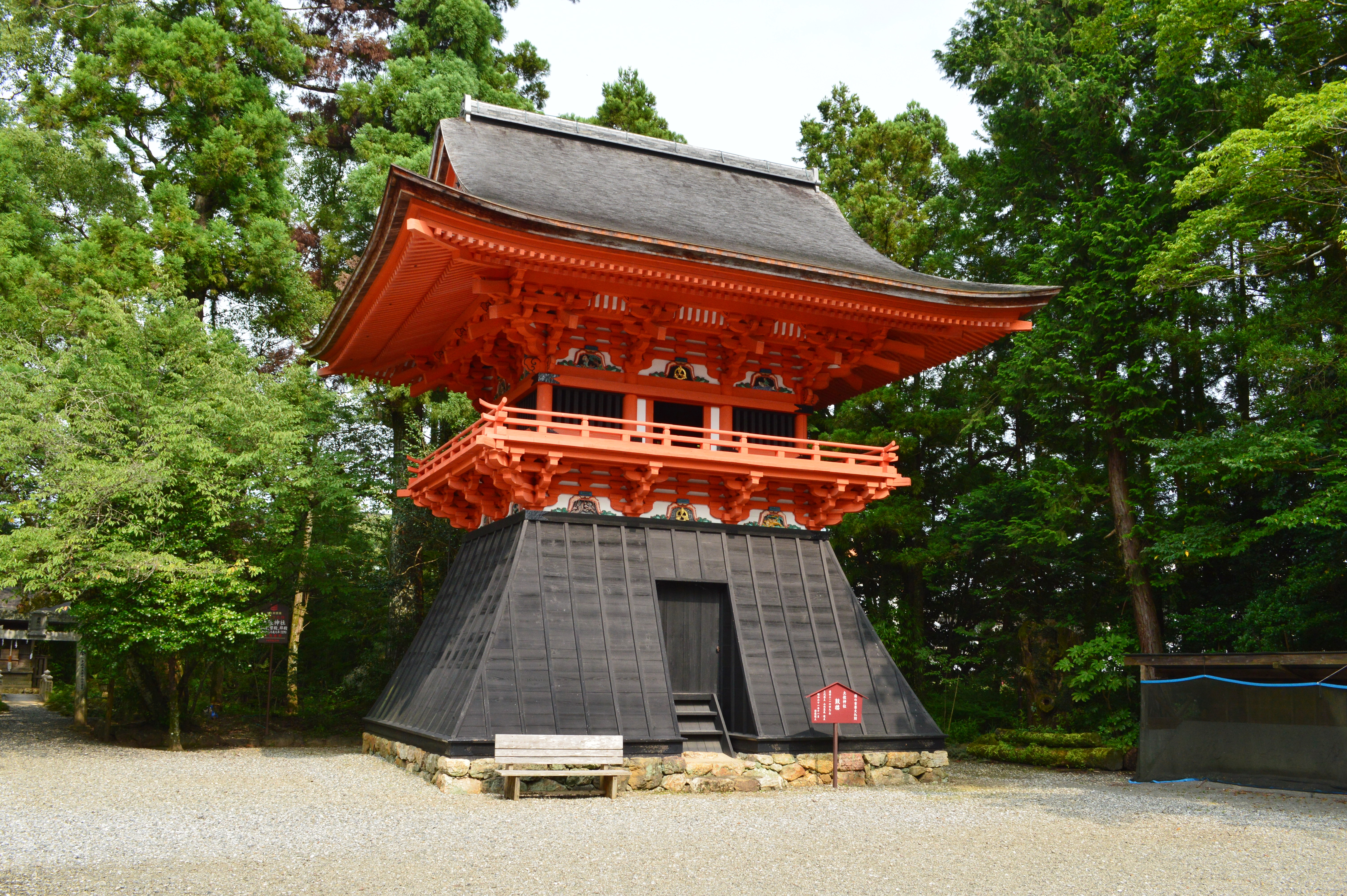 土佐神社 鼓楼